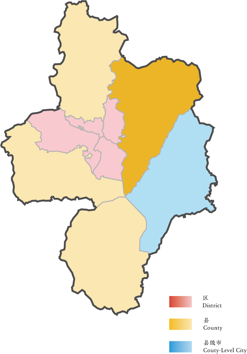 肥东县位置图